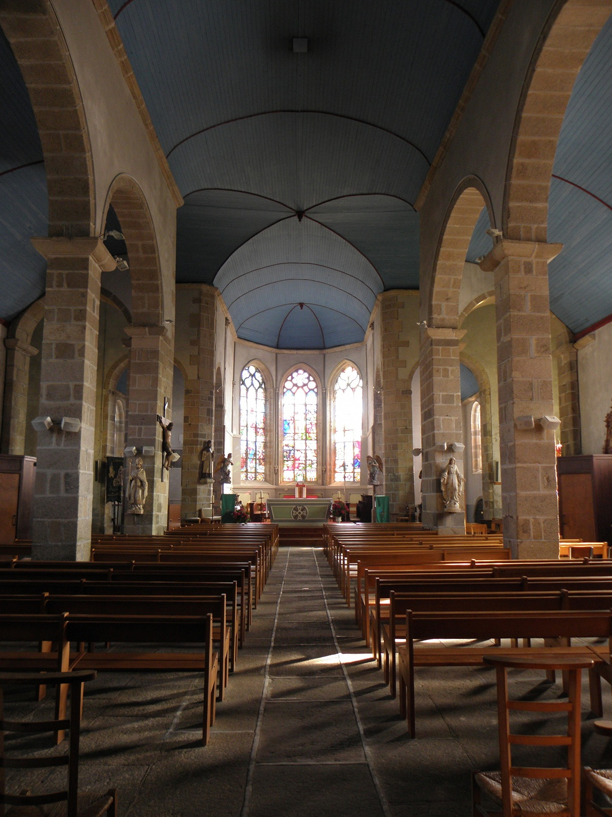 Intérieur de l'église Saint-Hervé de Lanhouarneau (29). .